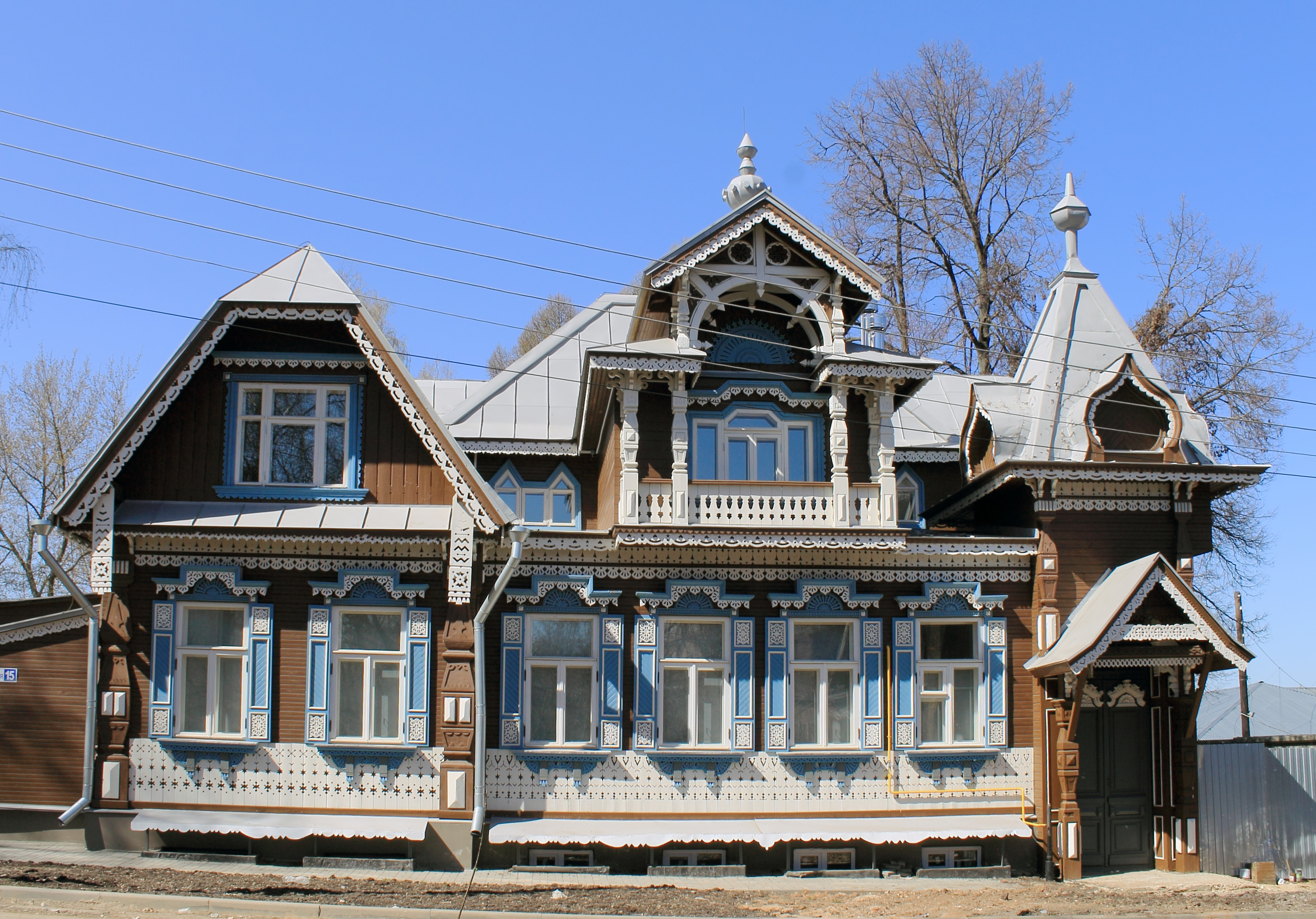 Особняк: улица Дальняя, 15, Нижний Новгород, Нижегородская область